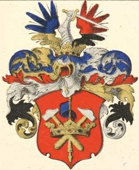 Smitteni suguvõsa aadlivapp